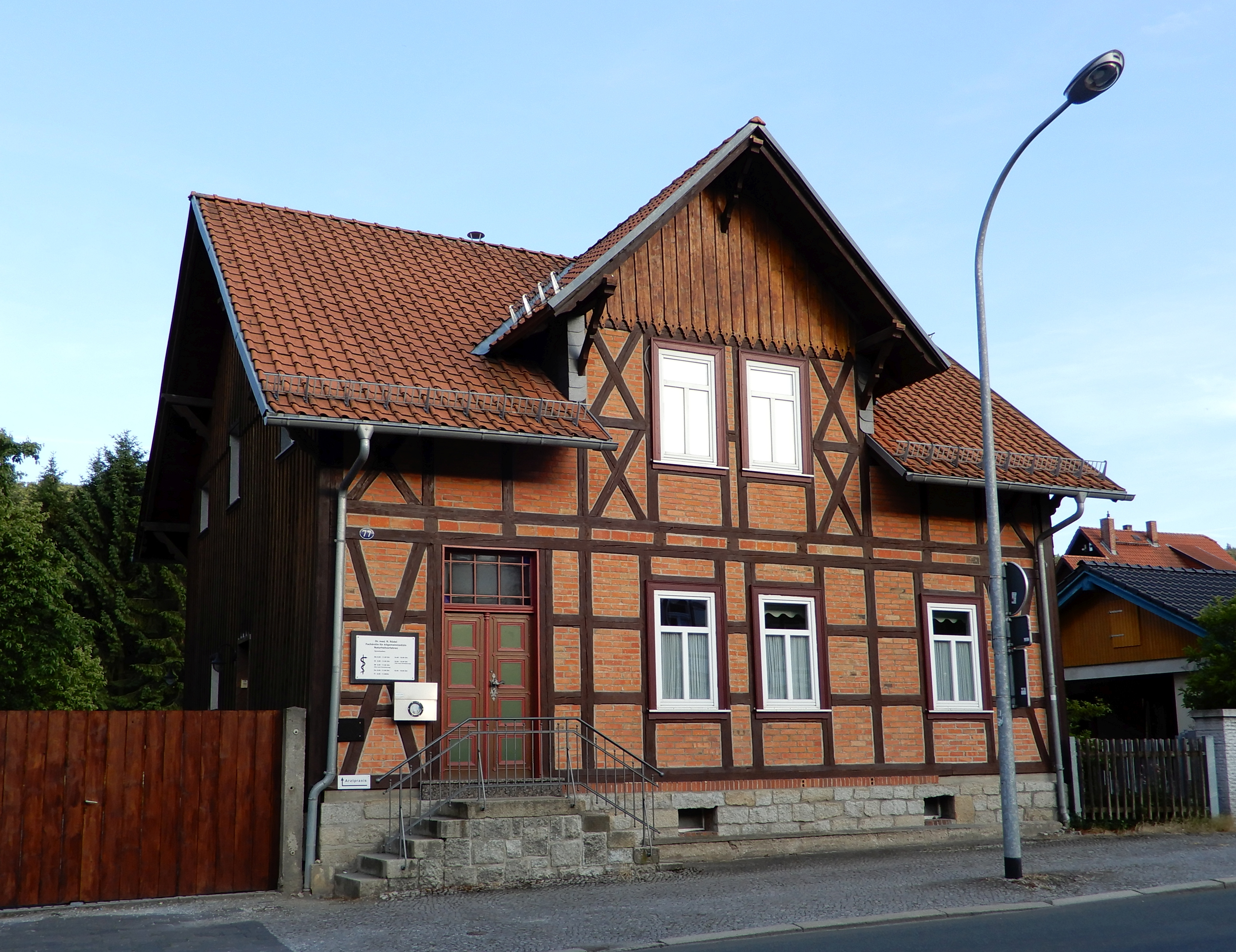 Wohnhaus in der Friedrichstraße in Hasserode